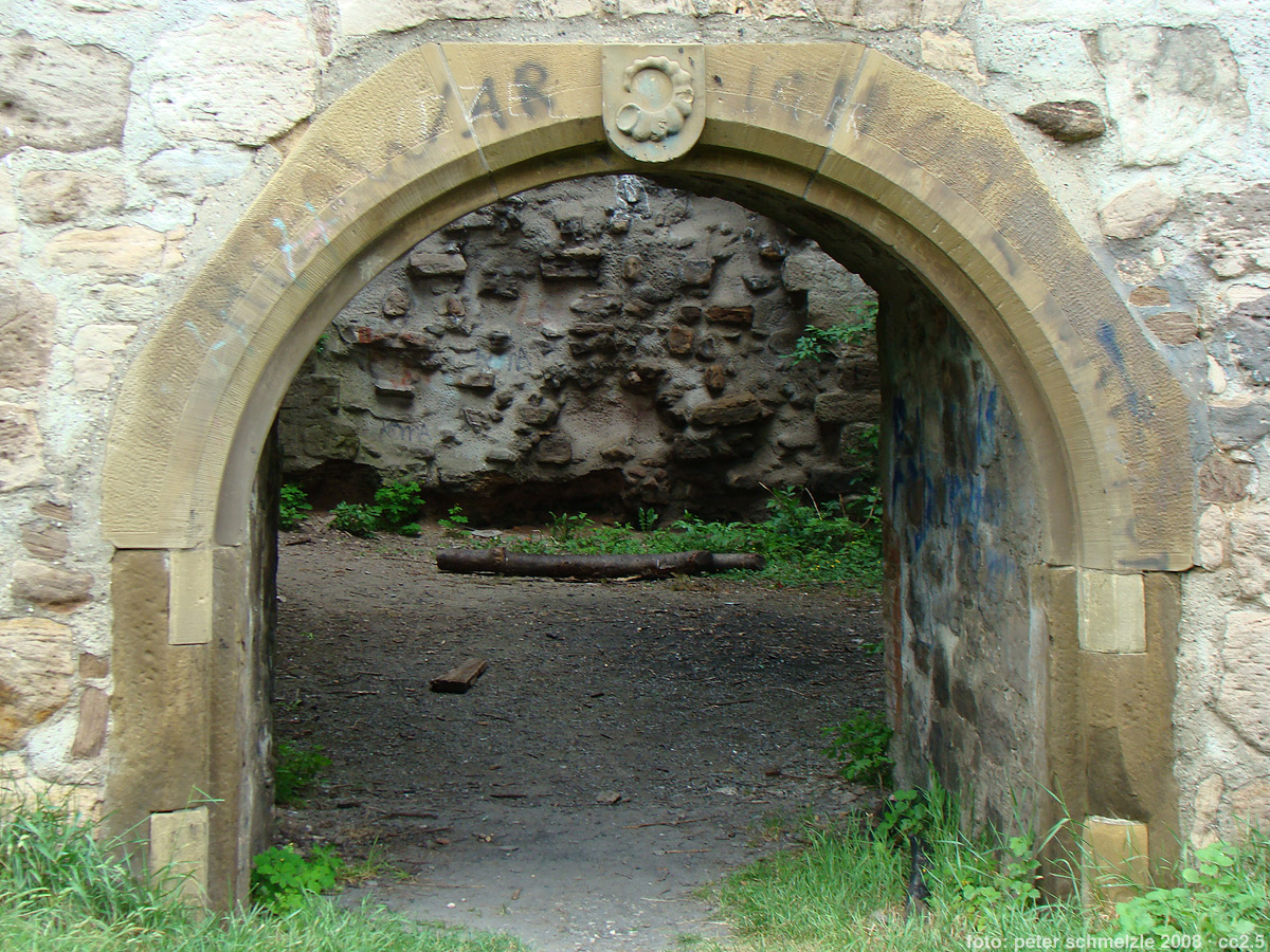 Portal an der Burgruine Helfenberg bei Ilsfeld